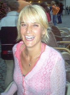 Een foto van Jetske van den Elsen tijdens de opnames van tegen de klok in Venlo.